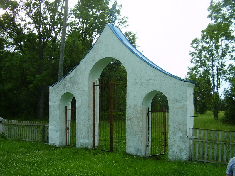 Шкунцікі. Царква Святога Ільі